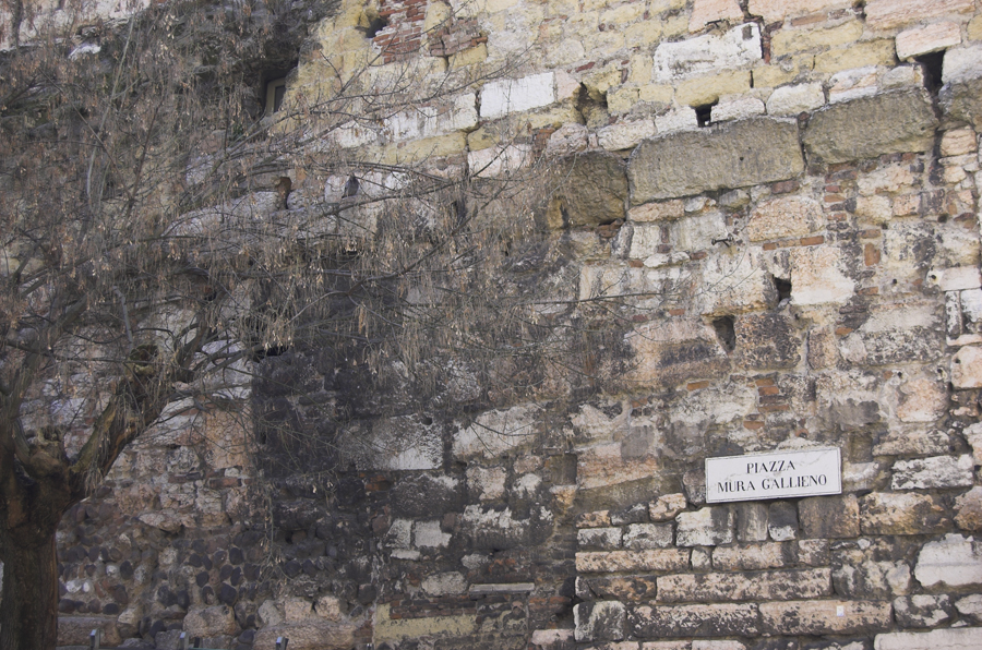 Resti delle mura romane in piazza mura di Gallieno